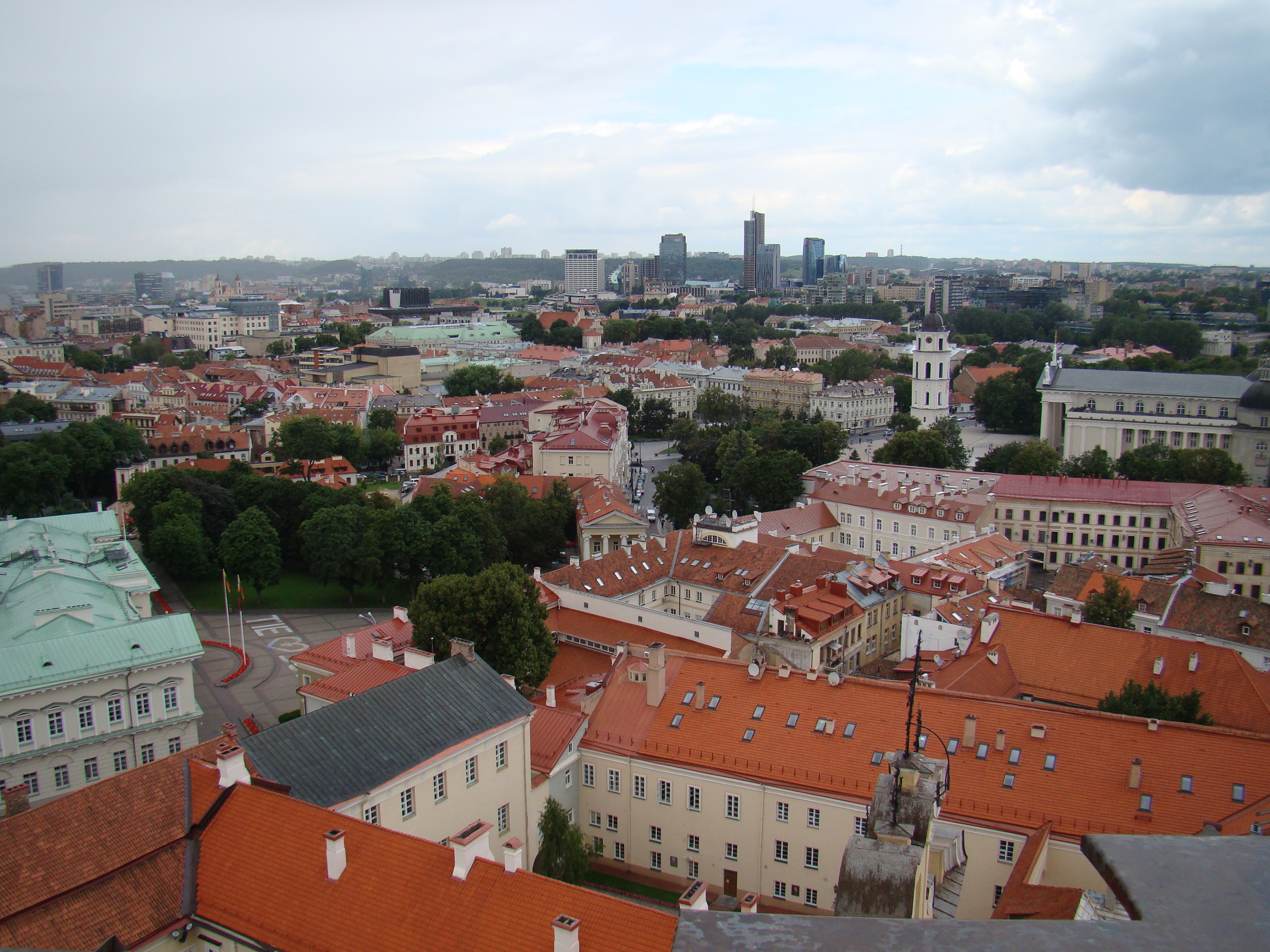 Vilniaus senamiesčio panorama nuo Šv. Jonų bažnyčios varpinės